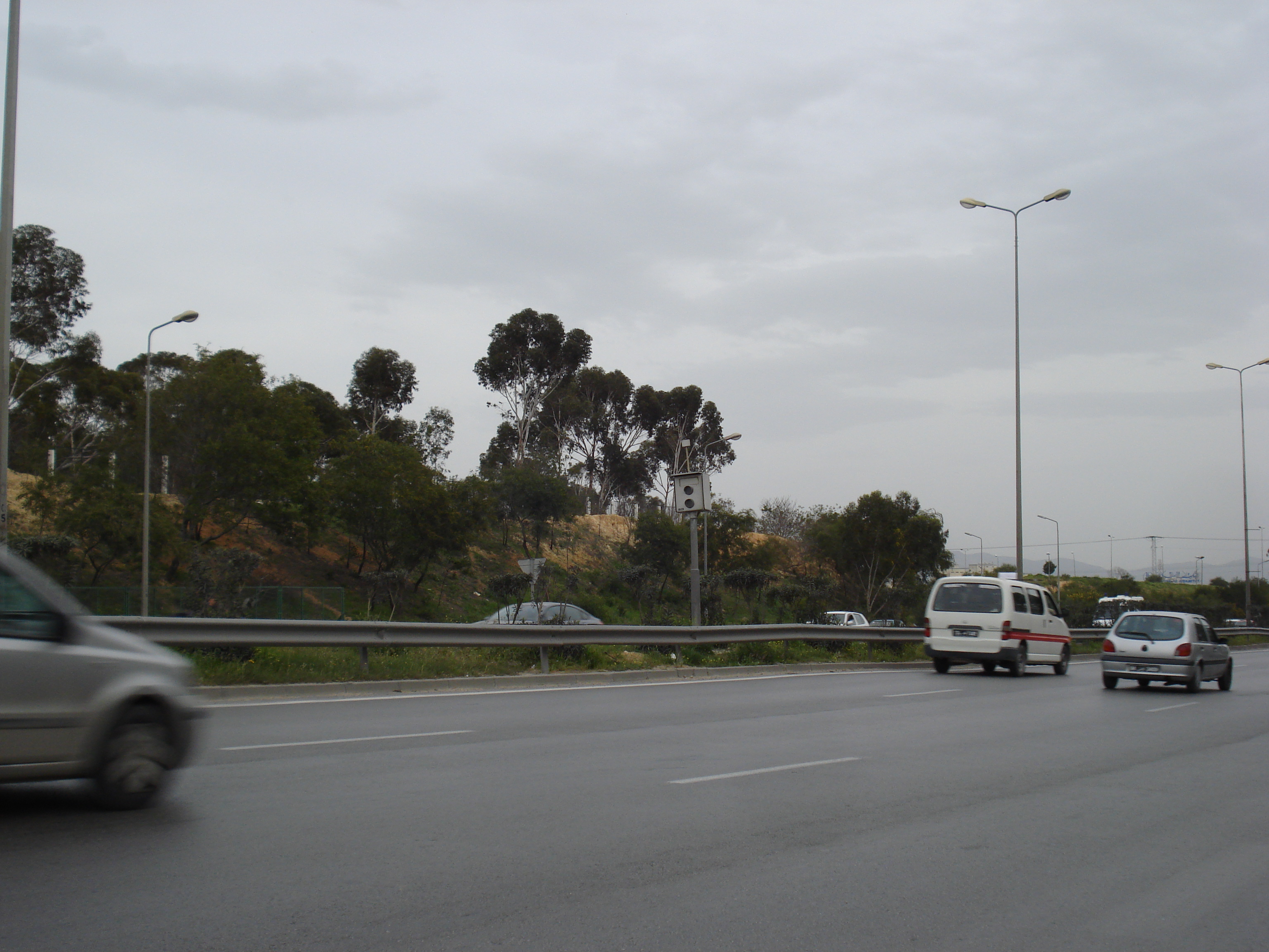 RR22 (Route régionale n°22) et radar automatique, Tunis, Tunisie